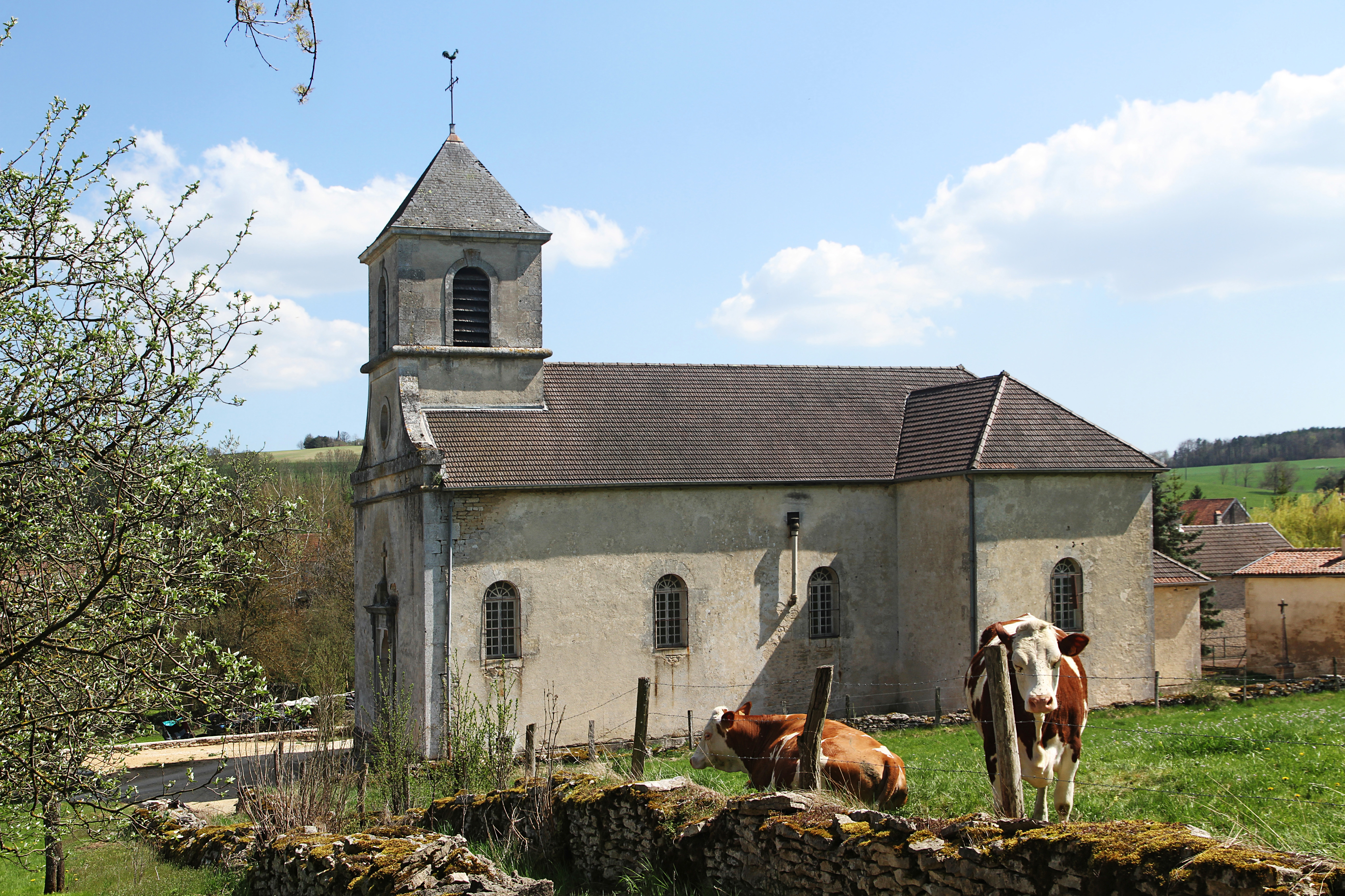 Église de la Nativité à Beneuvre